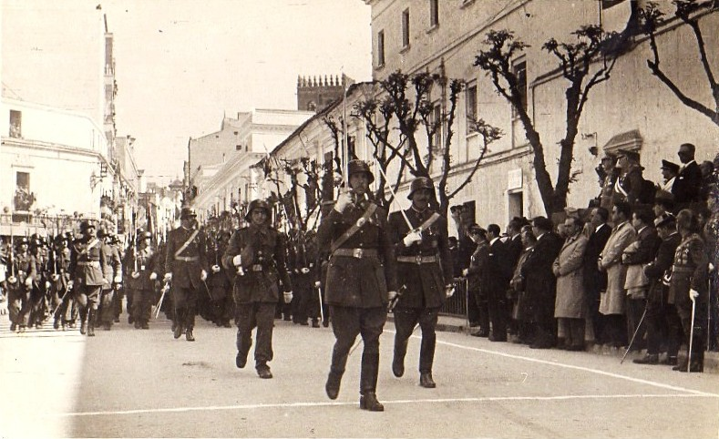 Desfile del Regimiento de Infantería Castilla nº 16 en Badajoz el día de la Patrona, La Inmaculada Concepción.